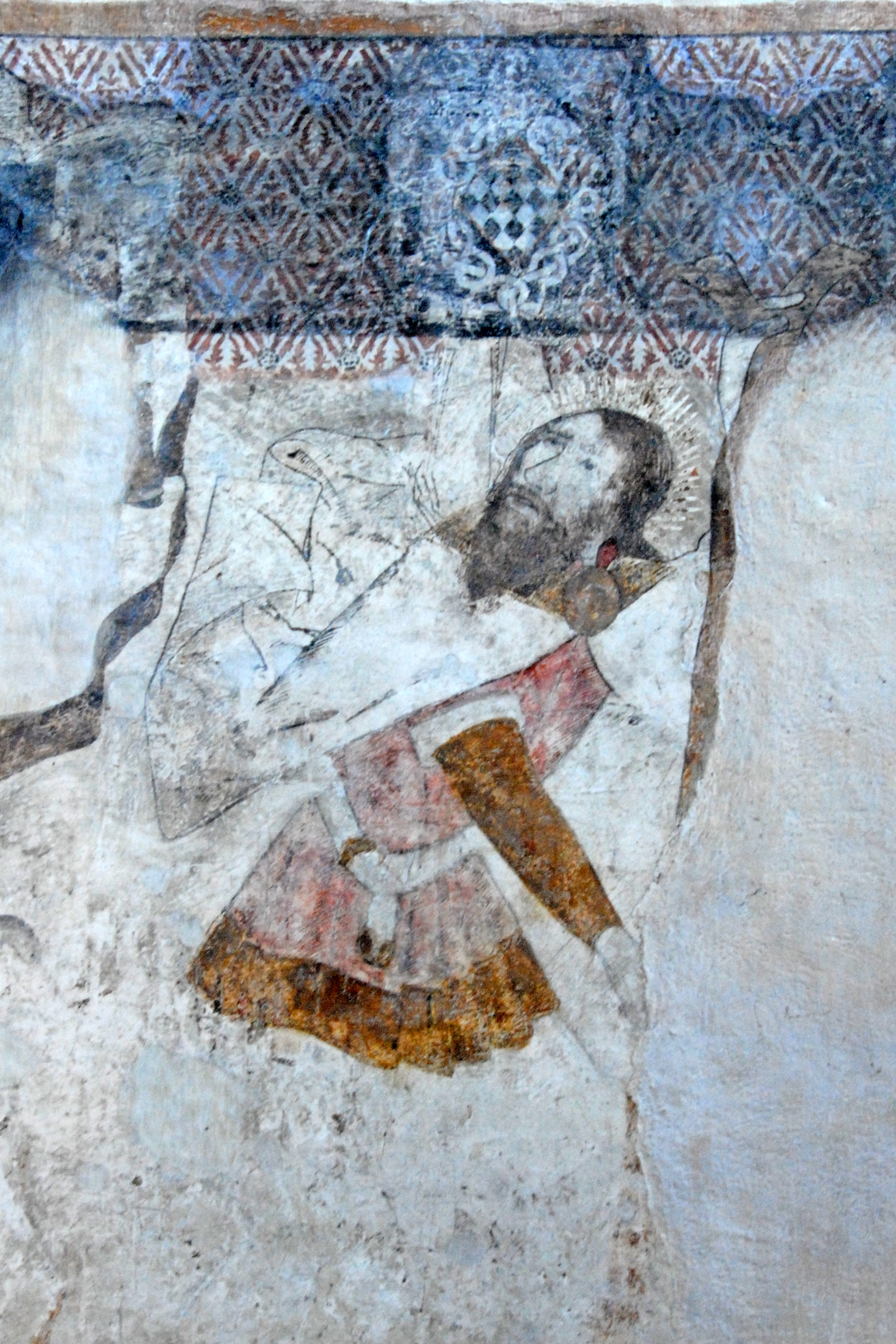 Kirche St.-André Lavaudieu, Fresko, Südwand, in Blendarkade von Joch 1